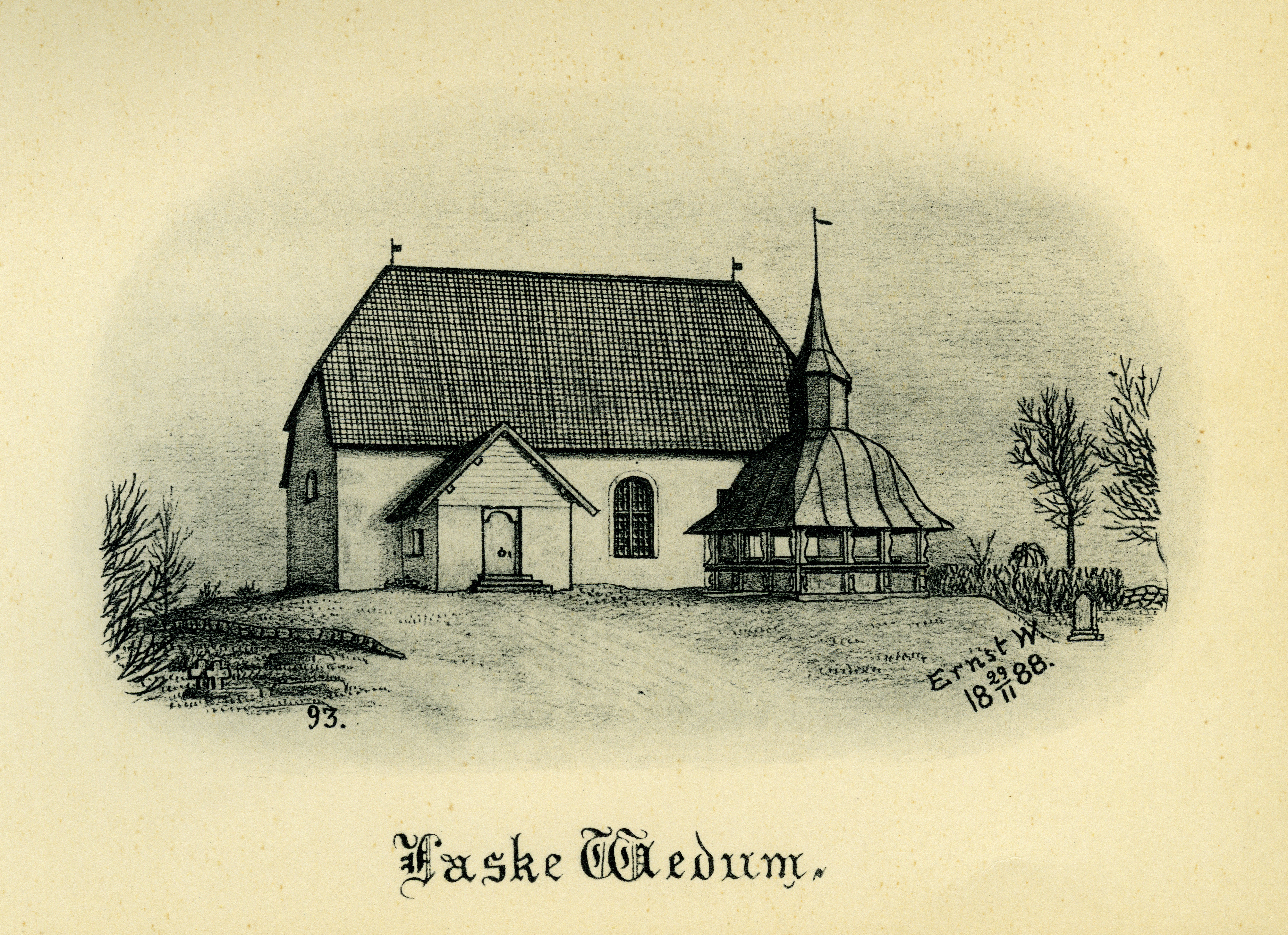 Laske-Vedums kyrka år 1888 i Laske härad, Skara stift, Västergötland, Sverige. Teckning av Ernst Wennerblad ur Skara stifts kyrkor (1902).